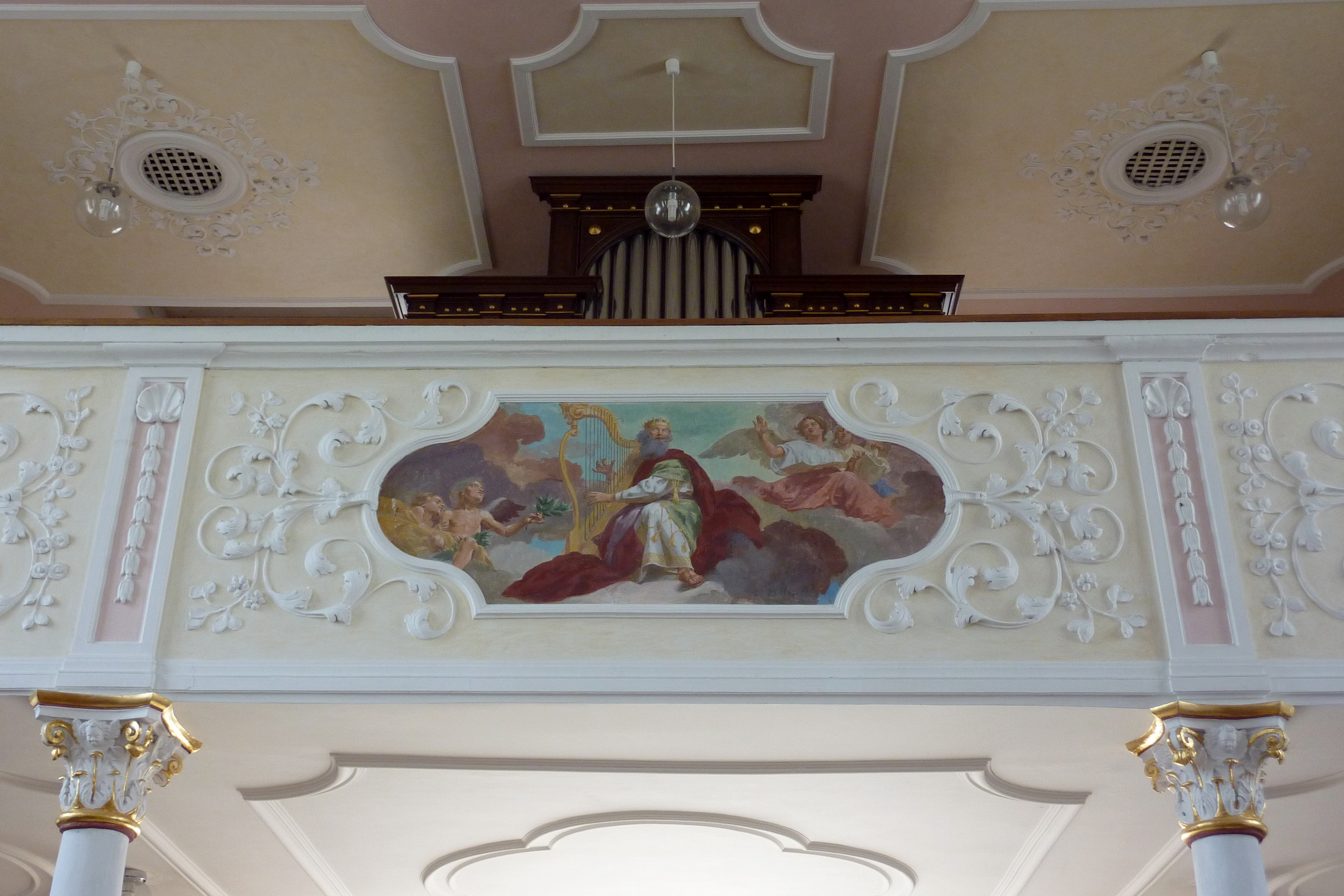 Katholische Pfarrkirche St. Peter und Paul in Ried (Jettingen-Scheppach) im Landkreis Günzburg (Bayern), Emporenbrüstung, Darstellung: König David spielt Harfe